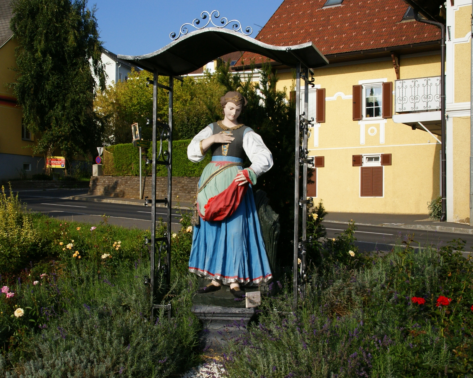 Figurenbildstock hl. Notburga